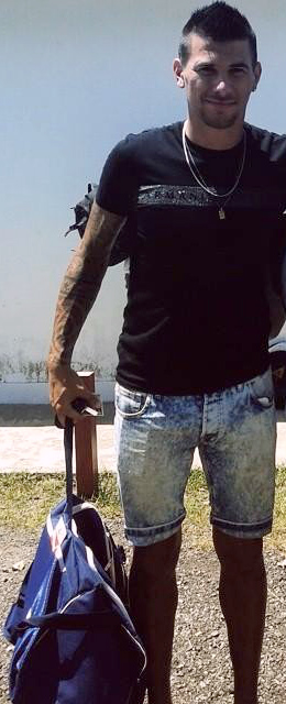 Víctor Cuesta, defensor de Independiente.